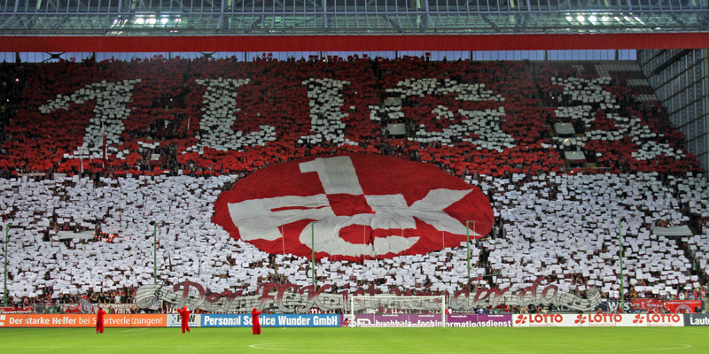 Choreographie zum ersten Heimspiel des 1. FC Kaiserslautern in der 1. Liga seit vier Jahren